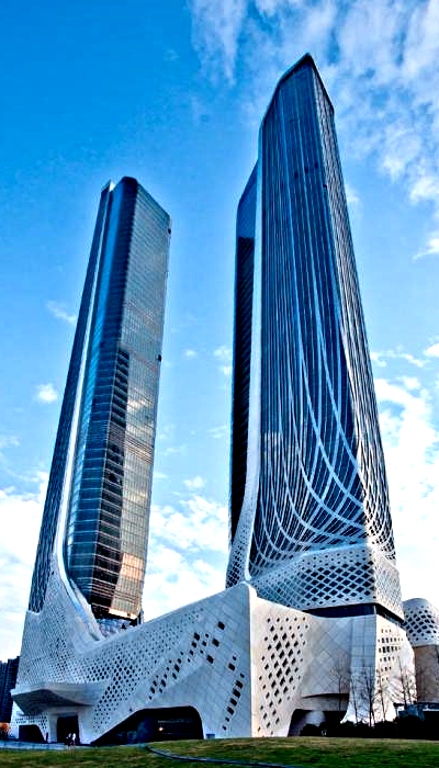 Youth Olympics Towers, Nanjing (Aug 2014)